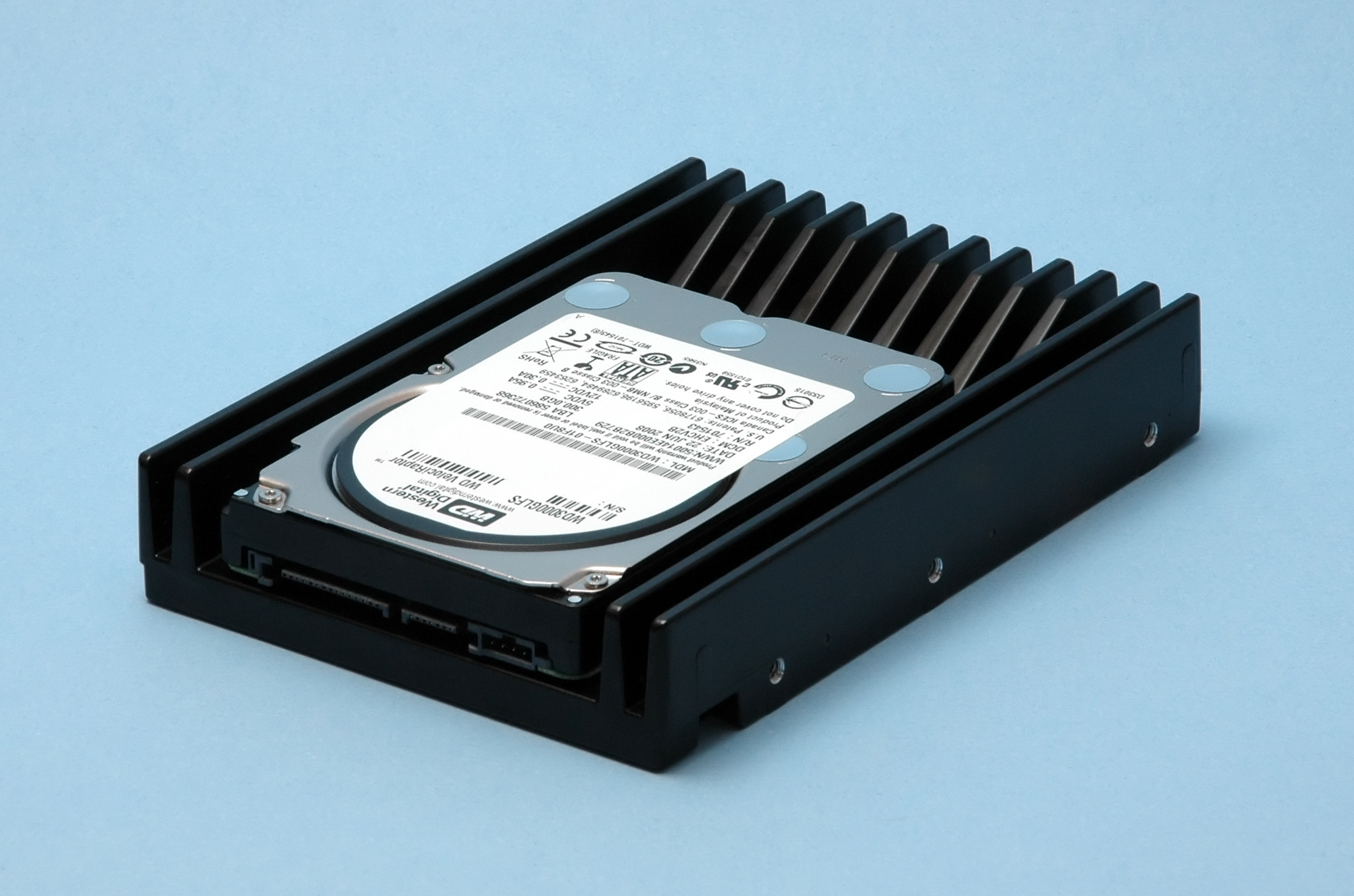 Western Digital VelociRaptor. 300GB. 10,000 RPMs